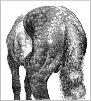 Atrophie du triceps crural après compression du nerf fémoral gauche pendant une crise de myoglobinurie sur un cheval de trait, CADIOT, Pierre-Juste, et ALMY, Julien. Traité de thérapeutique chirurgicale des animaux domestiques. 2e éd., Paris : Asselin et Houzeau, 1901-1903, t. 2, p. 469.